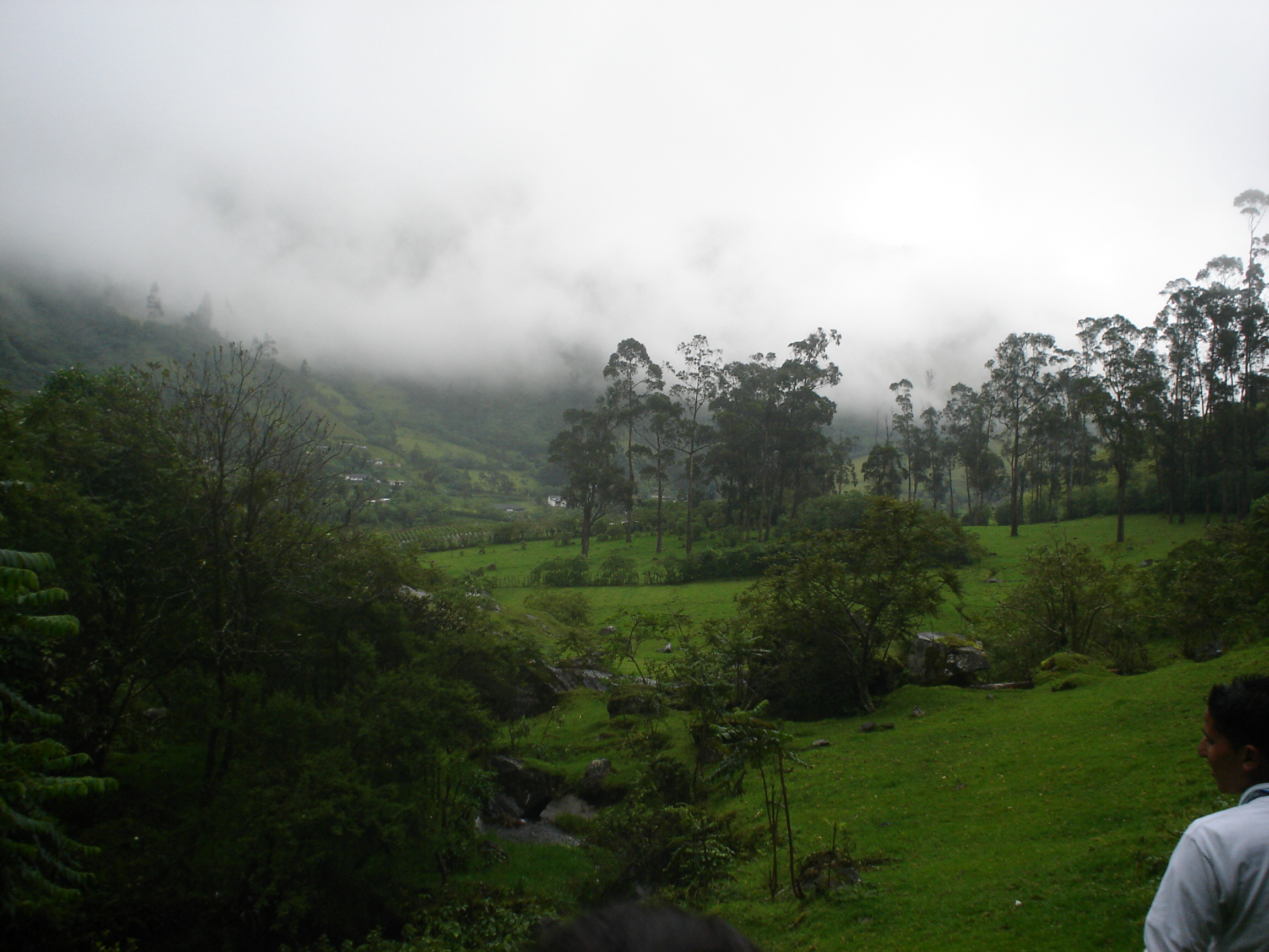 Esta fotografía fue tomada en un área protegida de Colombia con el Coconuco, Puracé, Cauca código 8F4V+J9 Coconuco, Puracé, Cauca del RUNAP.